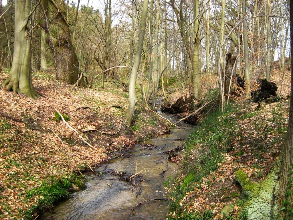 Der Lindower Rhin[1] ist einer der Zuflüsse des Huwenowsees. Er entspringt einem kleinen Soll in der Gemarkung Schönermark, durchfließt die Dölschseen, den Kirchsee und das Dorf Baumgarten und mündet bei der Baumgartener Badestelle in den Huwenowsee. In dem hier sichtbaren Abschnitt hat sich der Bach ein tiefes Tal in die Landschaft eingeschnitten. (Gemeinde Sonnenberg, Brandenburg). ↑ - BrandenburgViewer